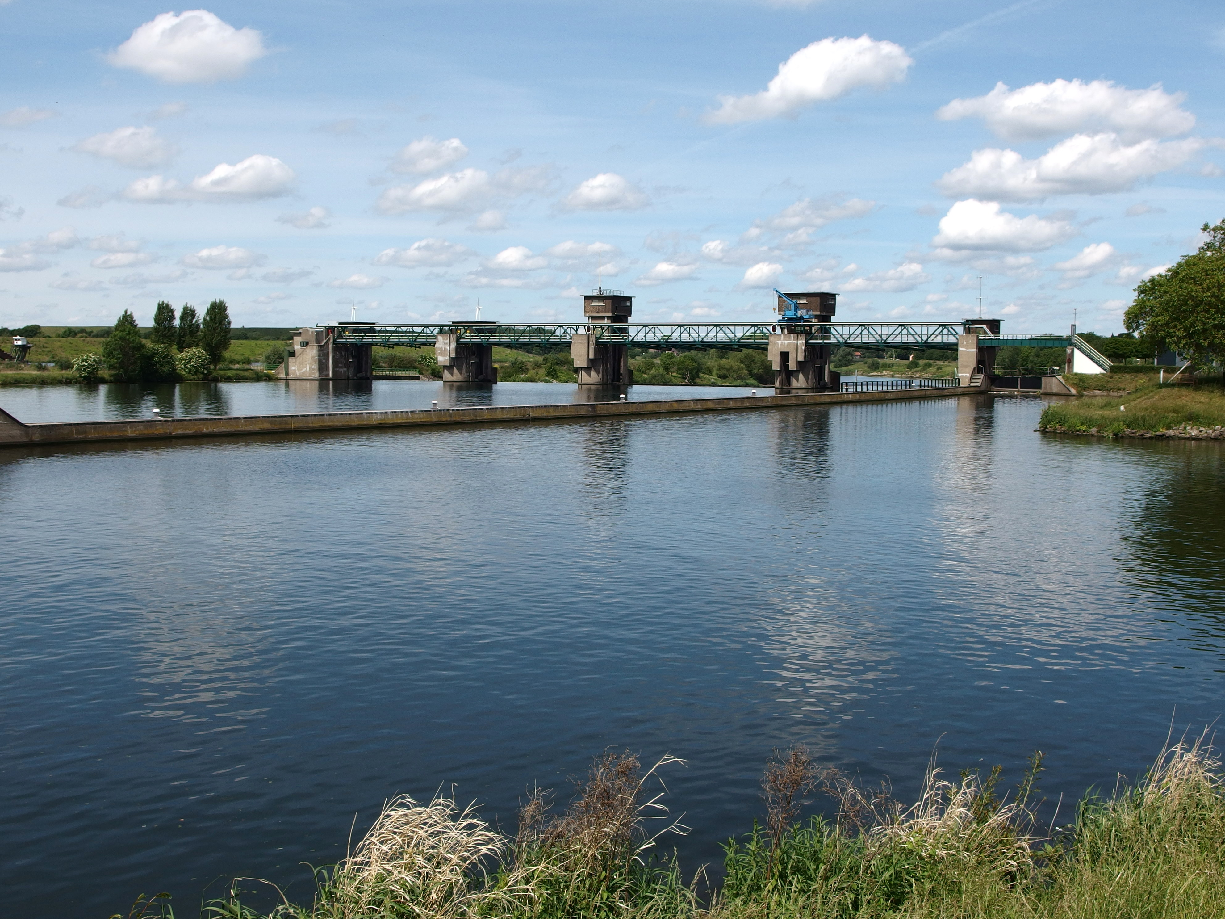 20140525 in Maastricht aan de Maas.